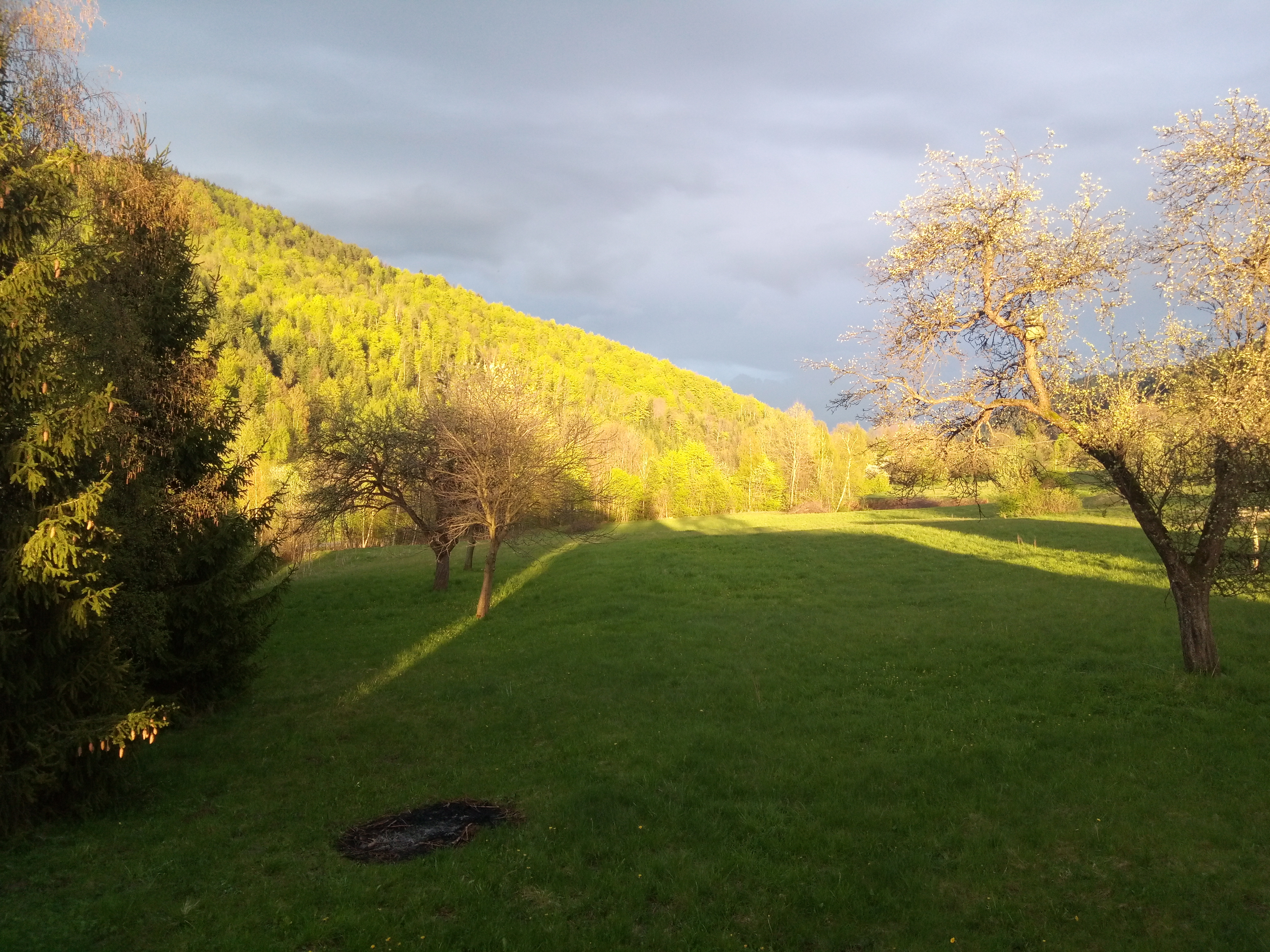 Góra Skiełek, widok z Młyńczysk